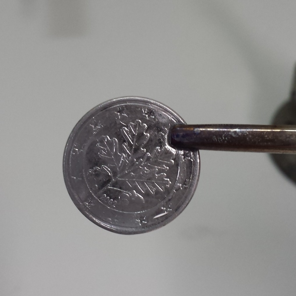 Quecksilberspiegel auf einer 5 Cent Münze.